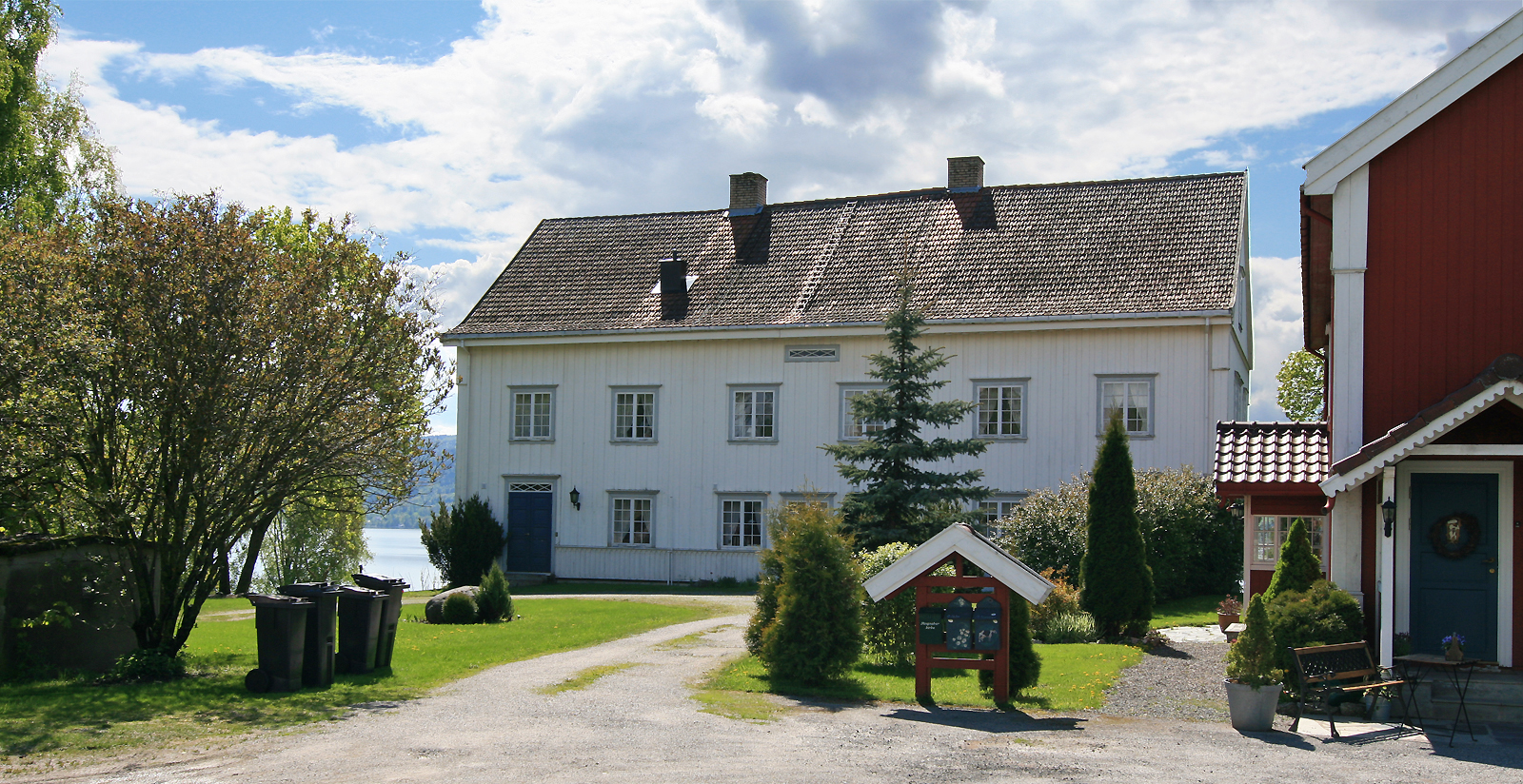 Ringsaker prestegård